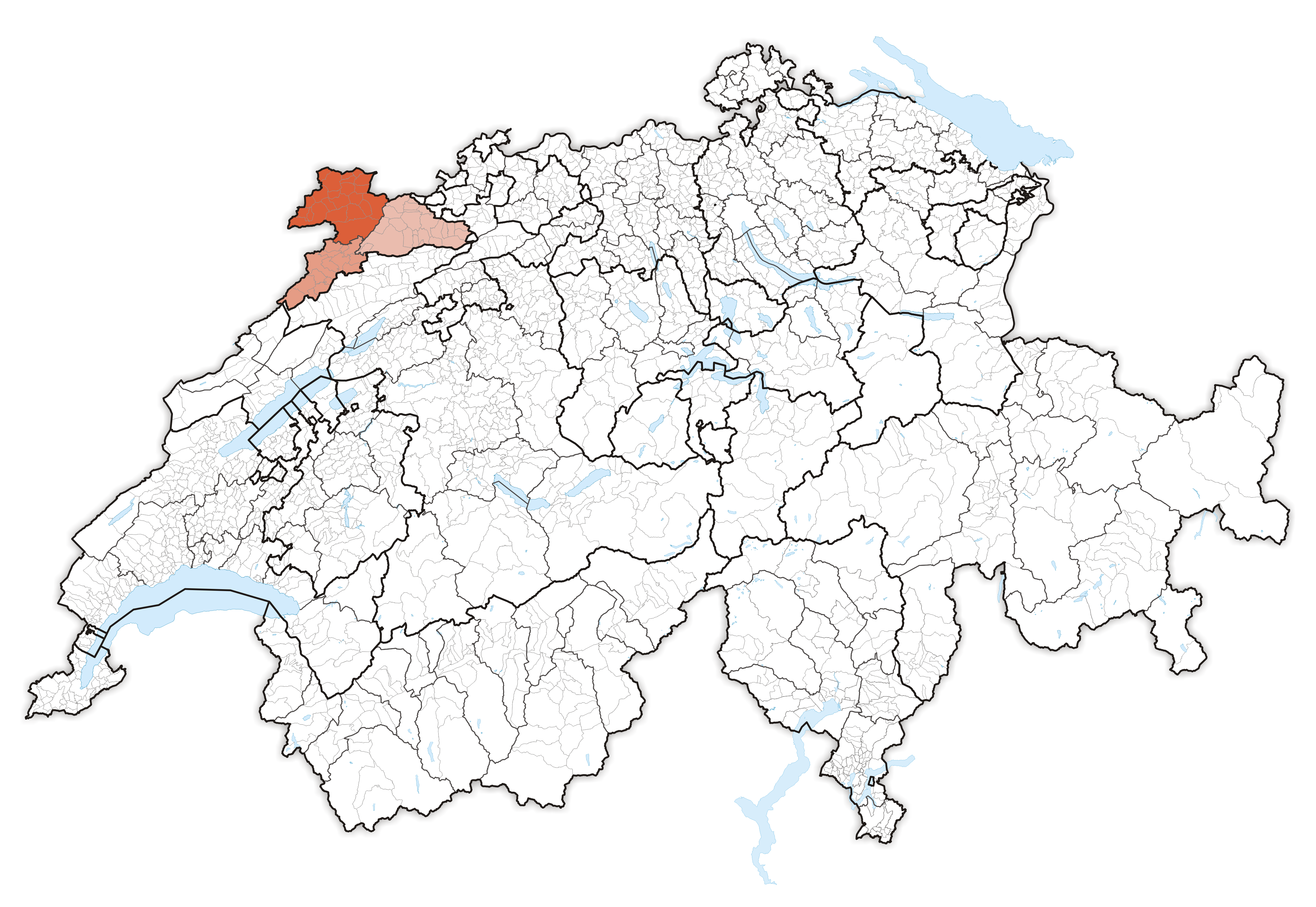 Canton Jura